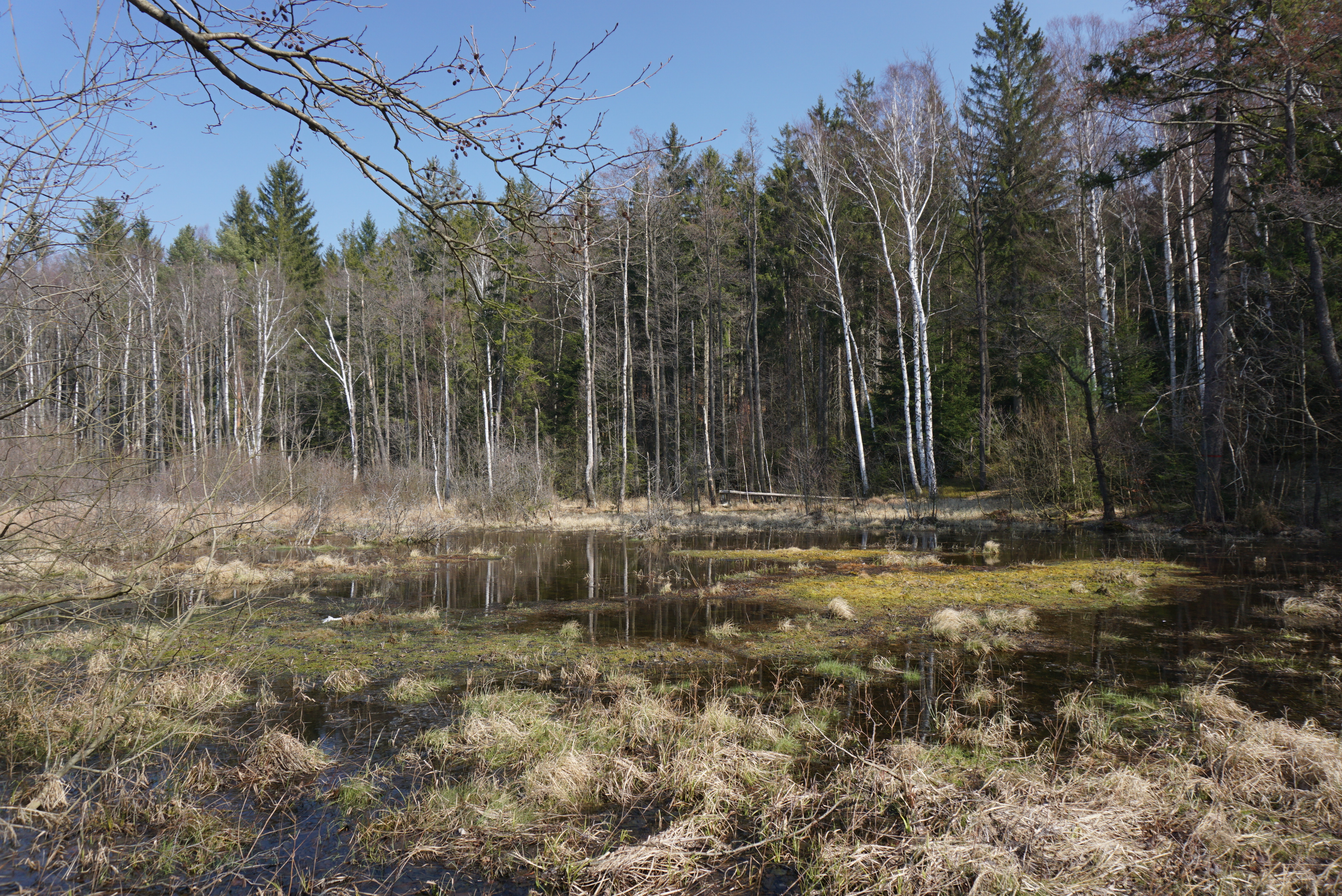 PP U Rozmoklé žáby - severní část (předjaří 2020)